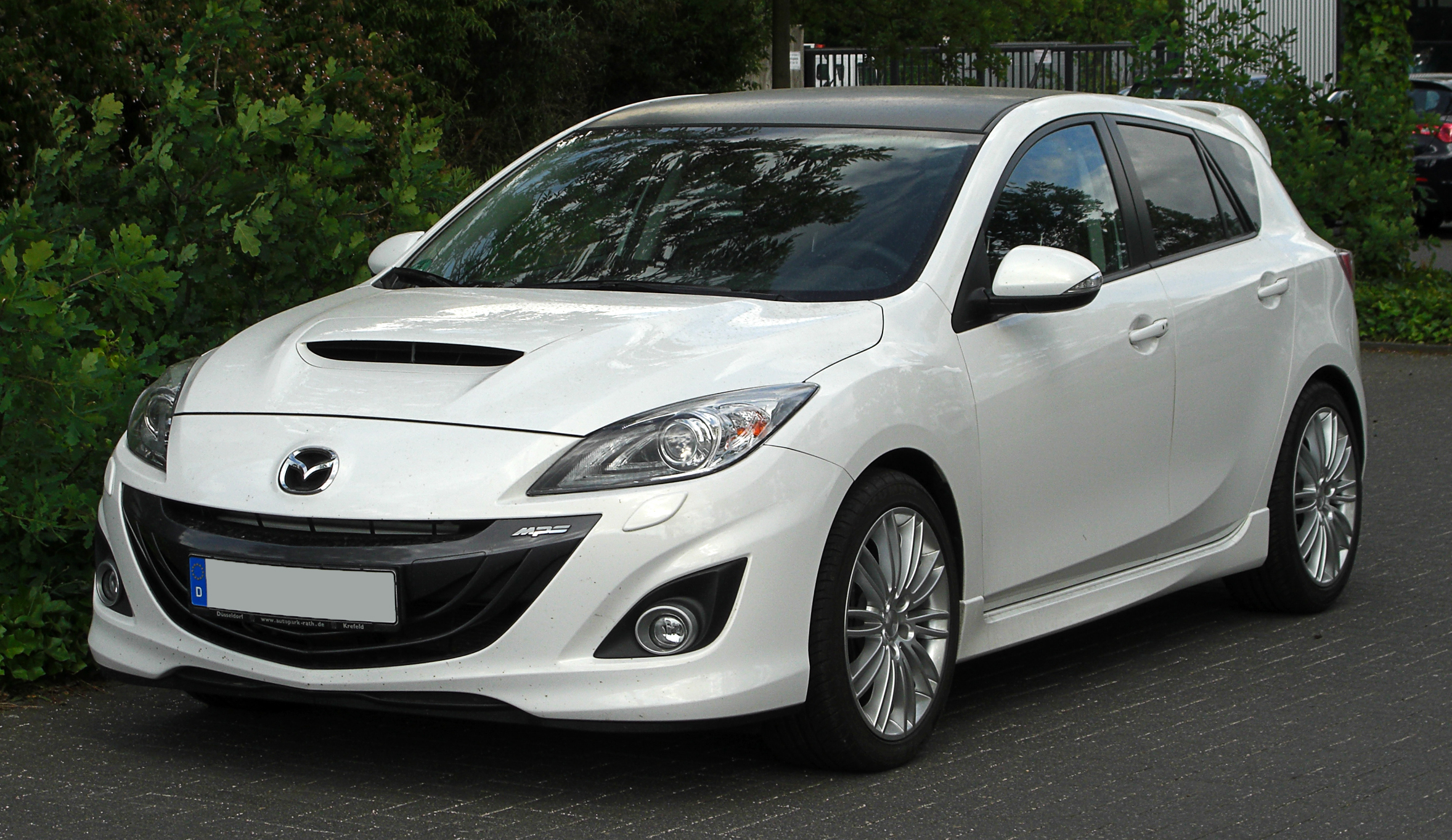 Mazda3 MPS (BL)